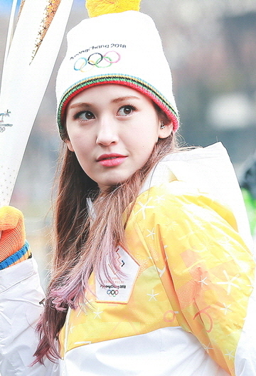 180113 성화봉송 소미